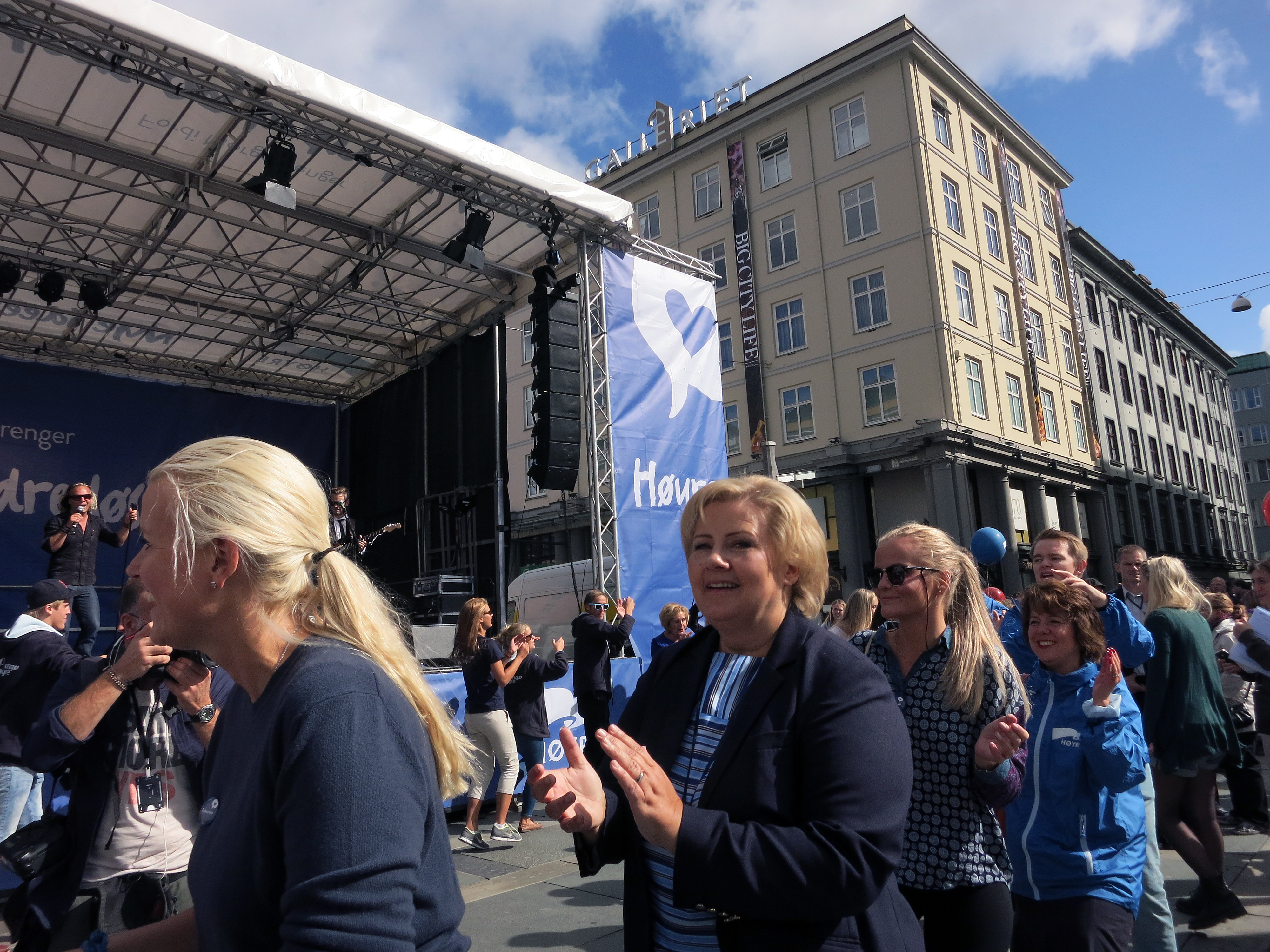 Erna Solberg under valgkampen i 2013